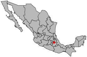 Location of Tlaxcala de Xicoténcatl (Ciudad de Tlaxcala), Tlaxcala, Mexico.